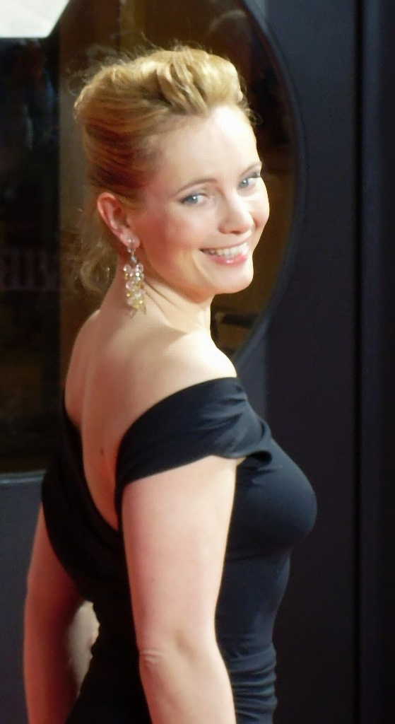 Nadja Uhl at Diva 2008